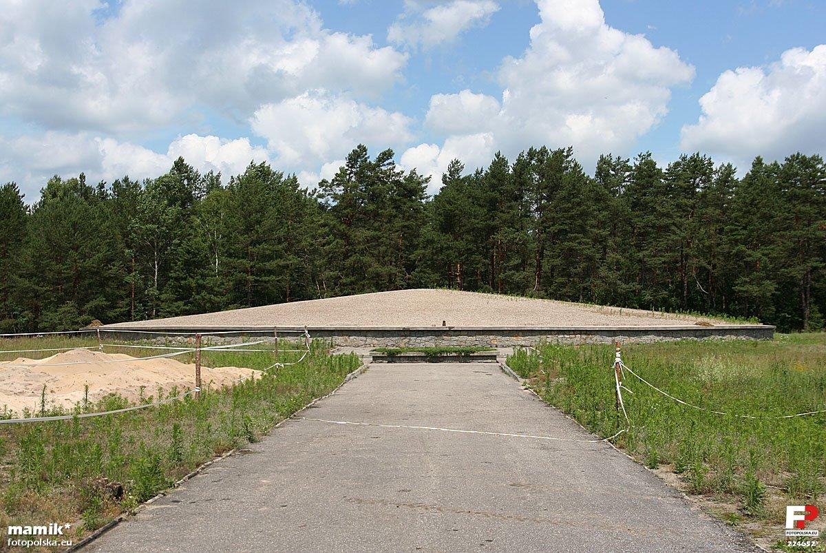 Pomnik upamiętniający zamordowanych w formie kopca usypanego z drobnych kamieni oraz z prochów ofiar